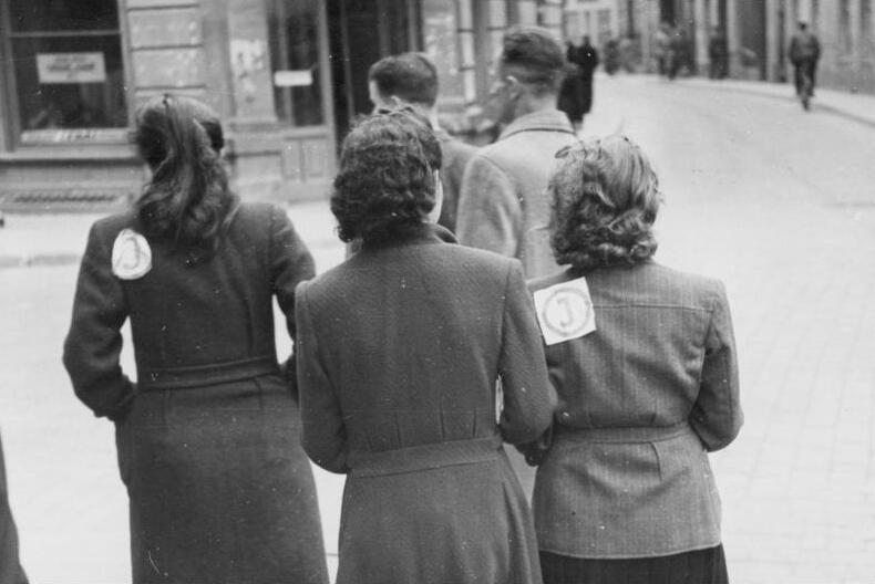 Wilna, Frauen mit Juden-Kennzeichen Kennzeichnung der Juden in Litauen. Wie im Königreich Kroatien und im Generalgouvernement müssen auch die Juden in Litauen jetzt durch besondere Kennzeichen sich von der nichtjüdischen Bevölkerung unterscheiden. Unser Bild zeigt mit einem "J" gekennzeichnete Juden auf einer Strasse in Wilna. 25.7.41 BER/BAA 59748